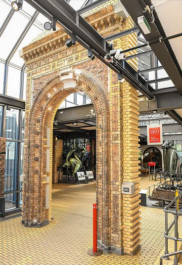 Das reprsäsentative Tor aus Formziegeln und Terrakotten wurde vor der Sprengung des Anhalter Bahnhofs gerettet und 1987 in der Ausstellung Schienenverkehr des Deutschen Technikmuseums wiederaufgebaut.